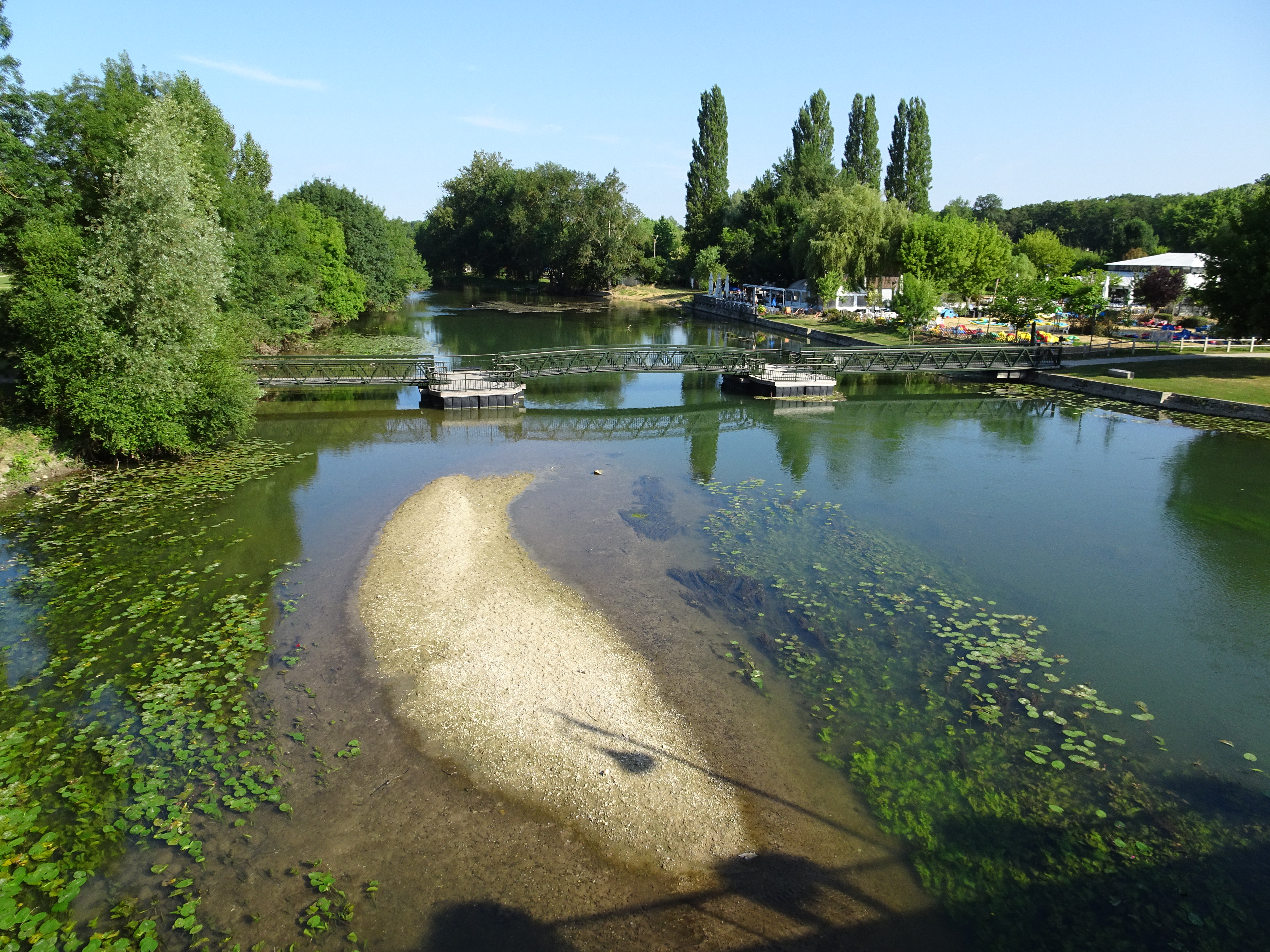 Centre ville de Montbazon.